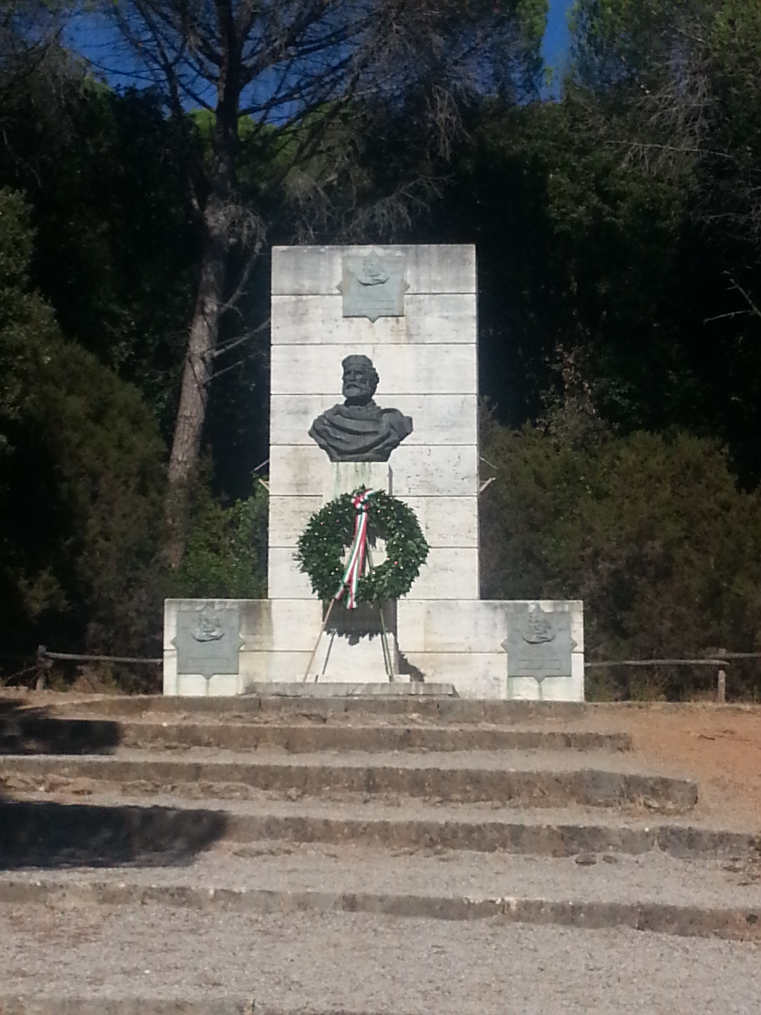 Monumento a Garibaldi nei pressi di Cala Martina Puntone Grosseto